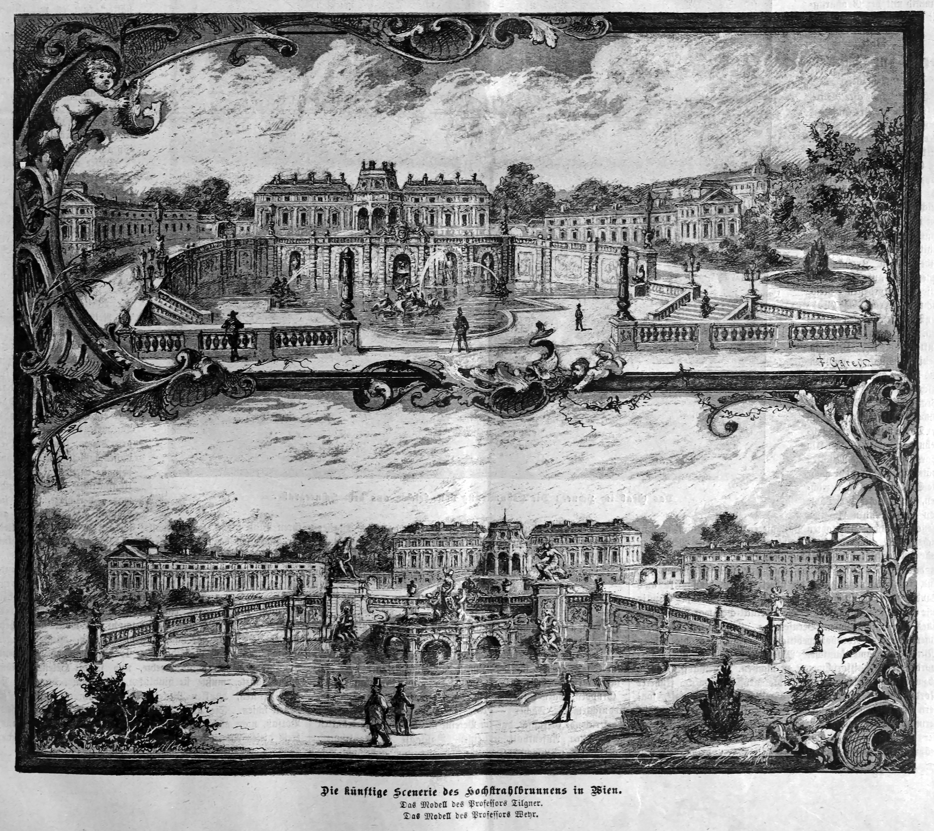 Wien, Schwarzenbergplatz, Hochstrahlbrunnen, Projekte Viktor Tilgner und Rudolf Weyr